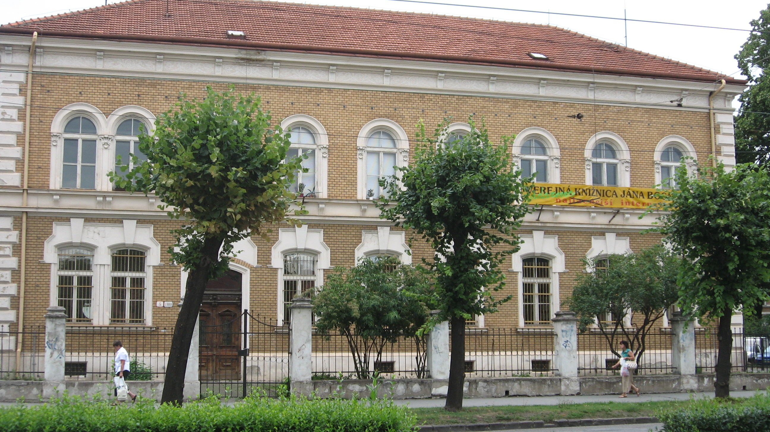 Verejná knižnica Jána Bocatia.